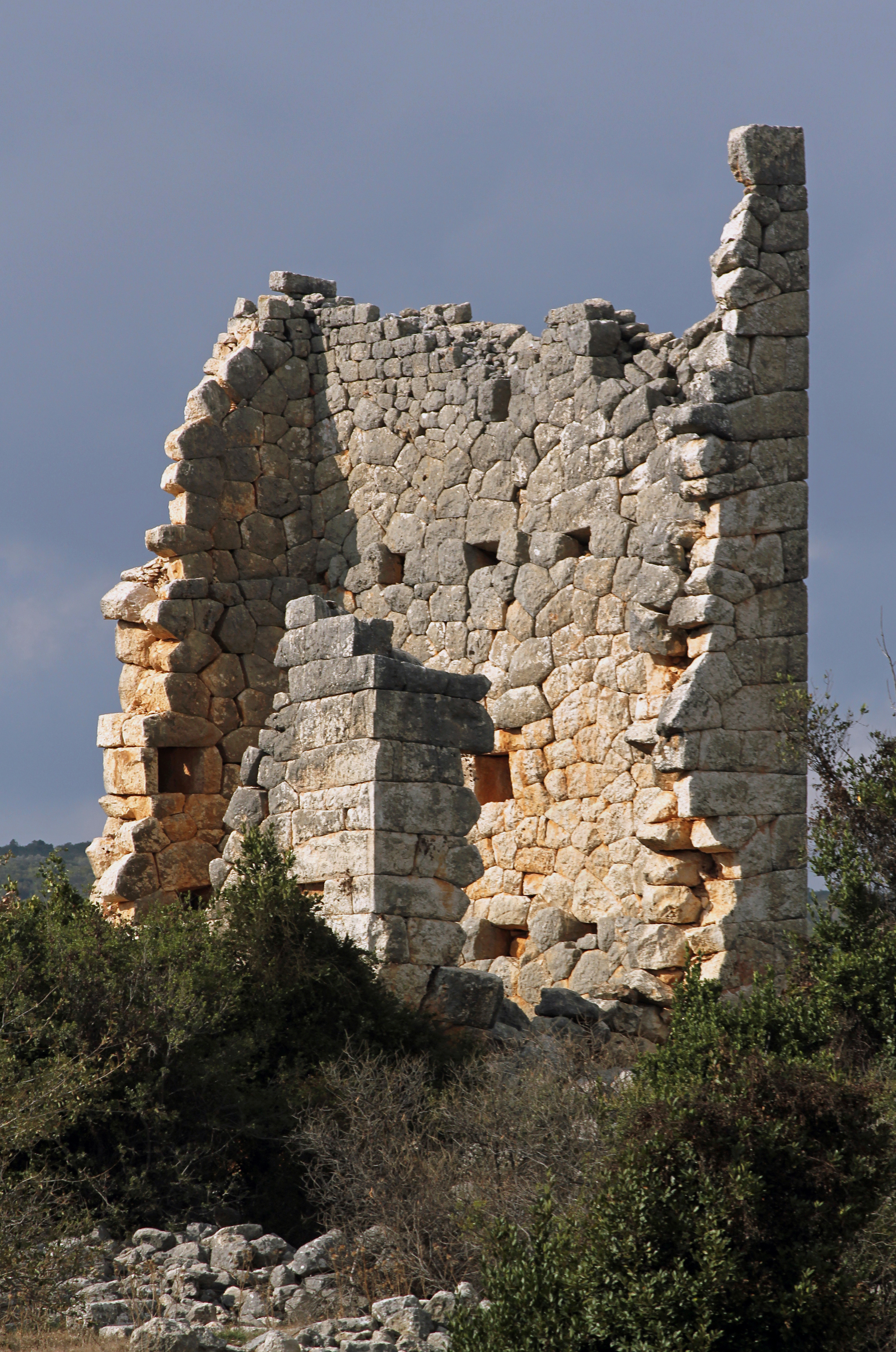 Emirzeli, byzantinische Kleinstadt im Rauhen Kilikien, Südtürkei, olbischer Turm von Süden